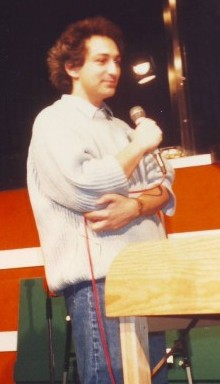 Michel Berger, musicien français.